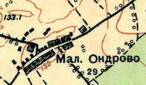 Топографическая карта Ленинградской области, квадрат О-35-24-Б-а (Переярово), деревня Малое Ондрово